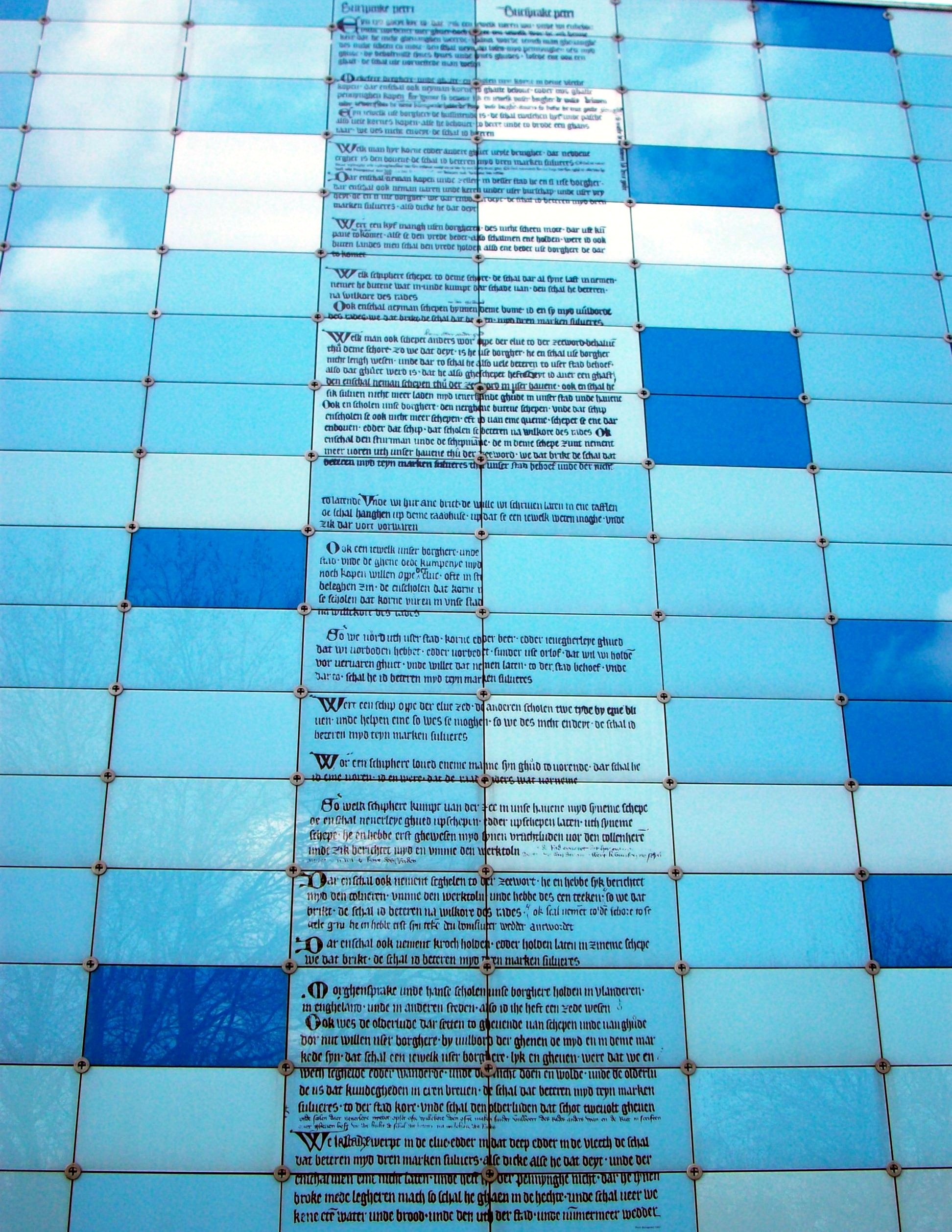 Staatsarchiv der Freien und Hansestadt Hamburg. Fassade mit Abbildung einer Petri-Bursprake (Vorschriftensammlung) von 1383 (siehe detail).